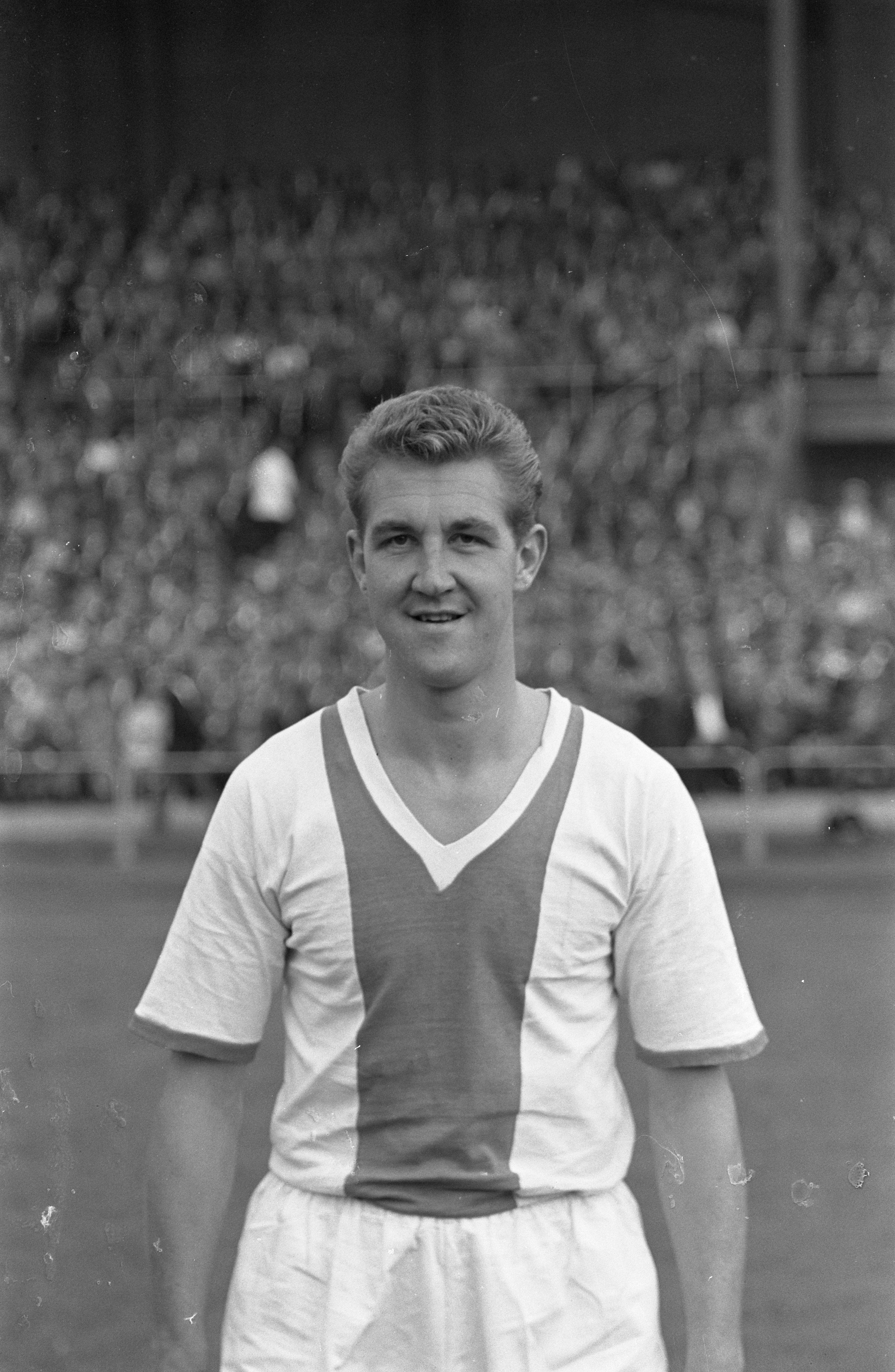 Collectie / Archief : Fotocollectie Anefo Reportage / Serie : [ onbekend ] Beschrijving : DWS tegen Ajax 1-0, Cees Groot Datum : 20 september 1959 Locatie : Amsterdam, Noord-Holland Trefwoorden : portretten, sport, voetbal, voetballers Persoonsnaam : Groot, Cees Fotograaf : Pot, Harry / Anefo Auteursrechthebbende : Nationaal Archief Materiaalsoort : Negatief (zwart/wit) Nummer archiefinventaris : bekijk toegang 2.24.01.05 Bestanddeelnummer : 910-6884